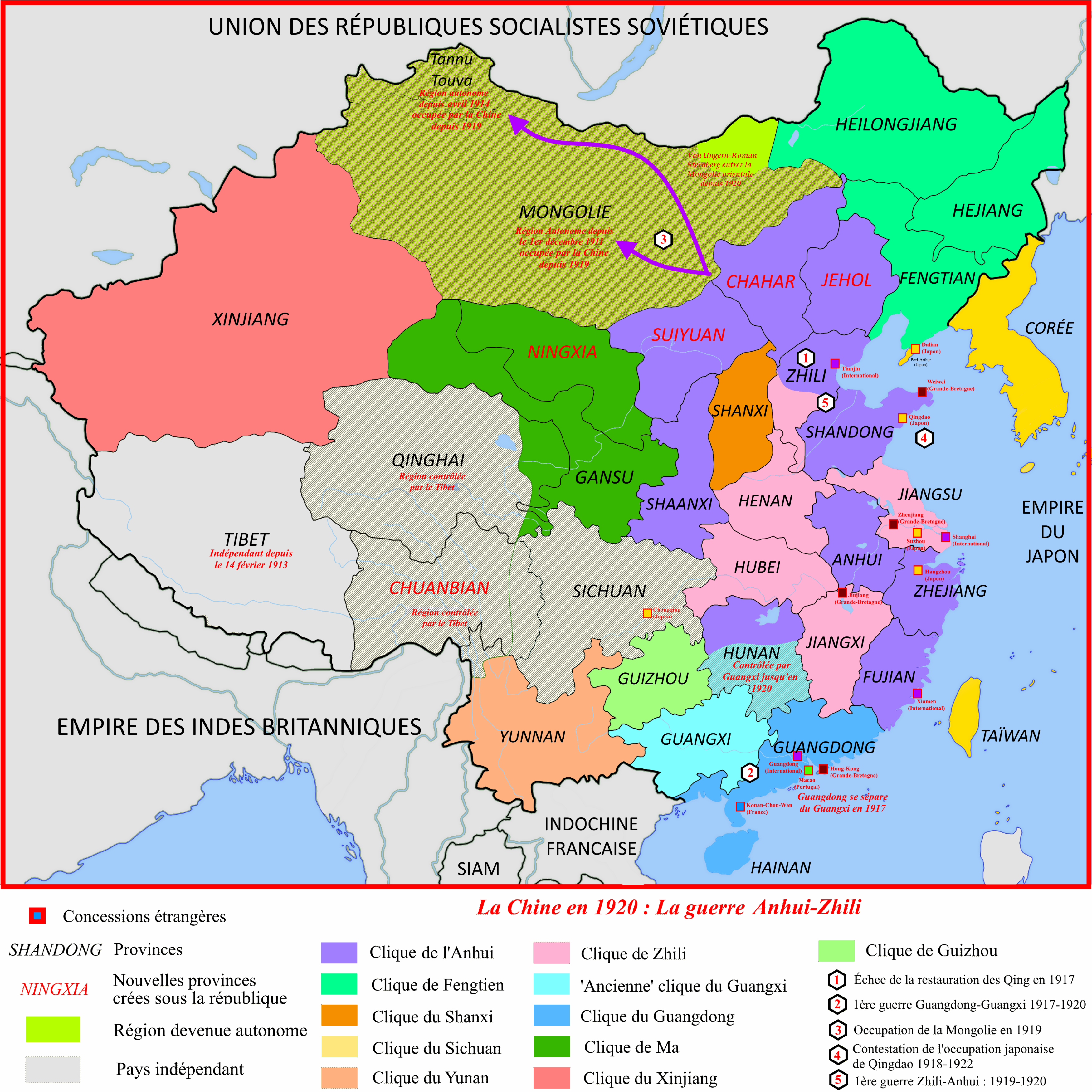 Carte des évènements historiques de la Chine entre 1917 et 1920